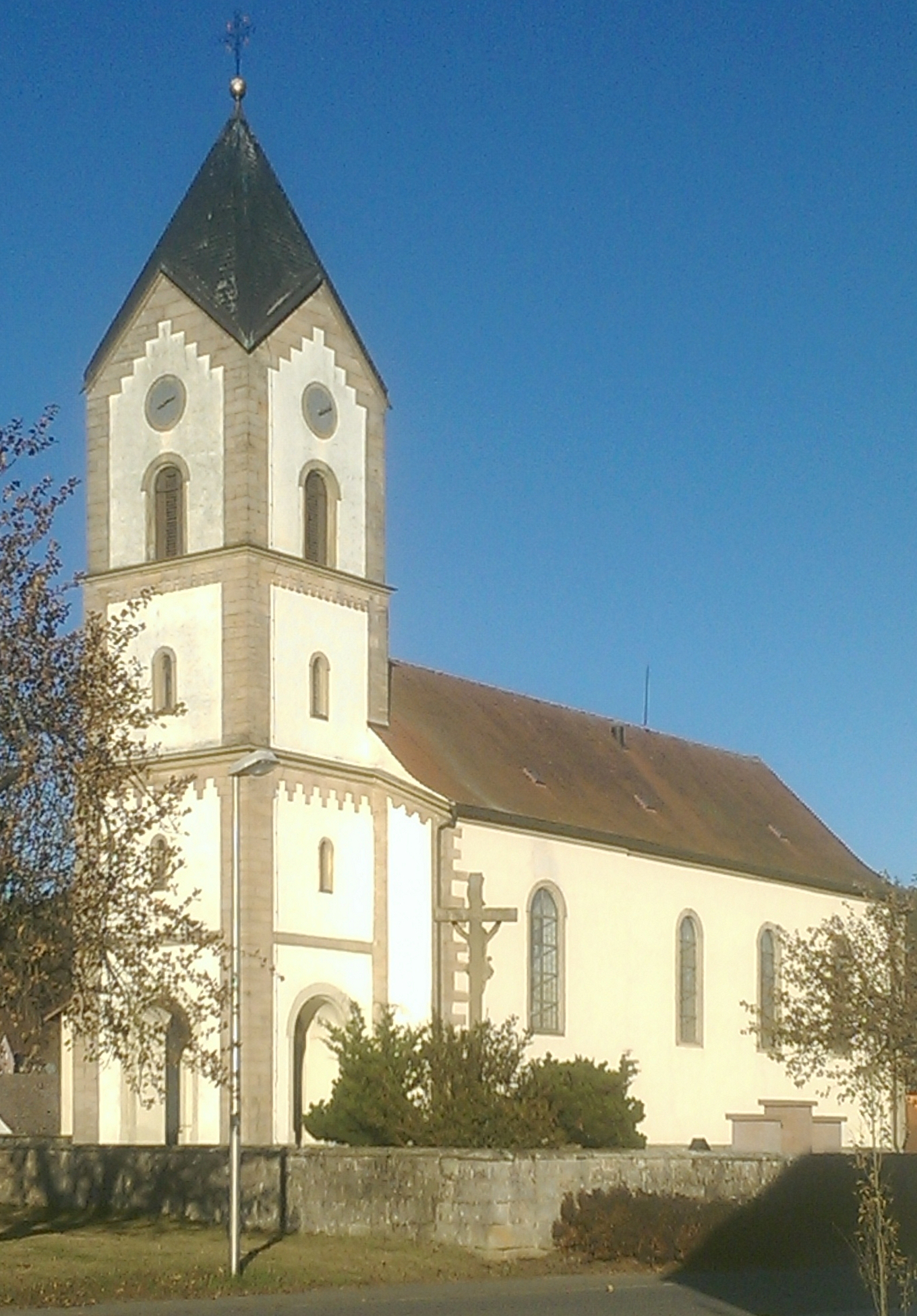 Wallfahrtskirche